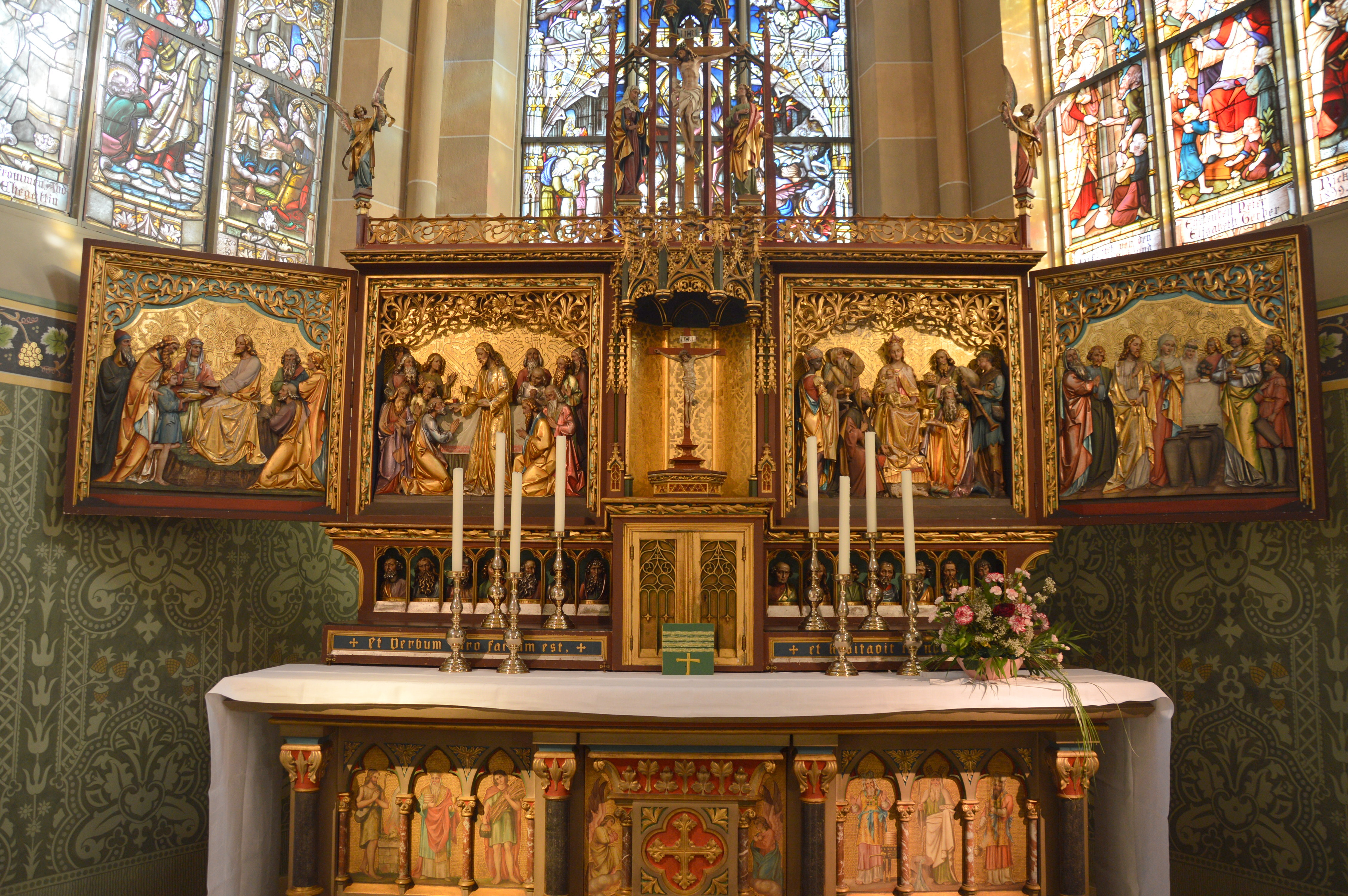 Flügelaltar St. Matthäus Bad Sobernheim